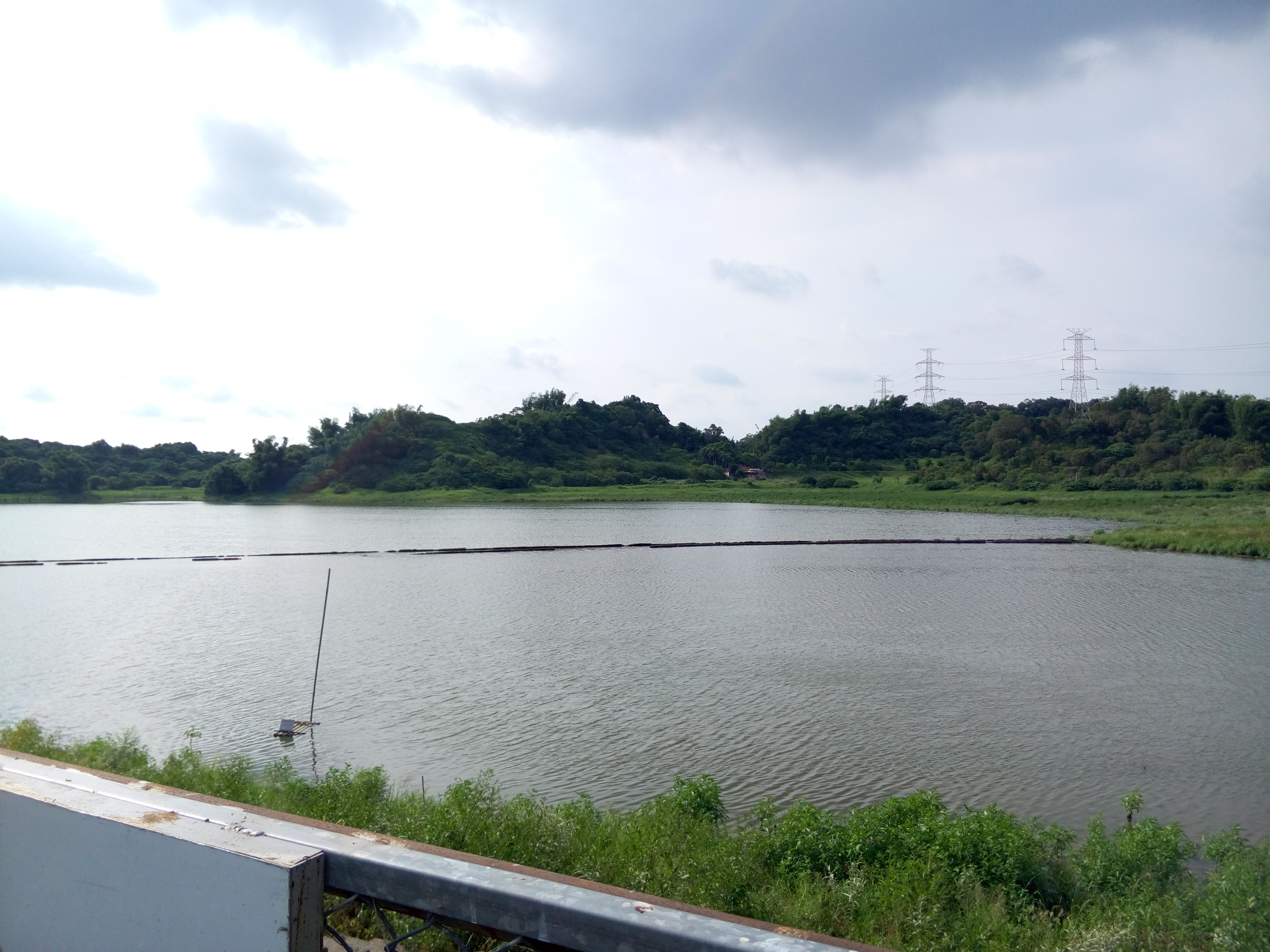 觀音湖水庫的內湖景色